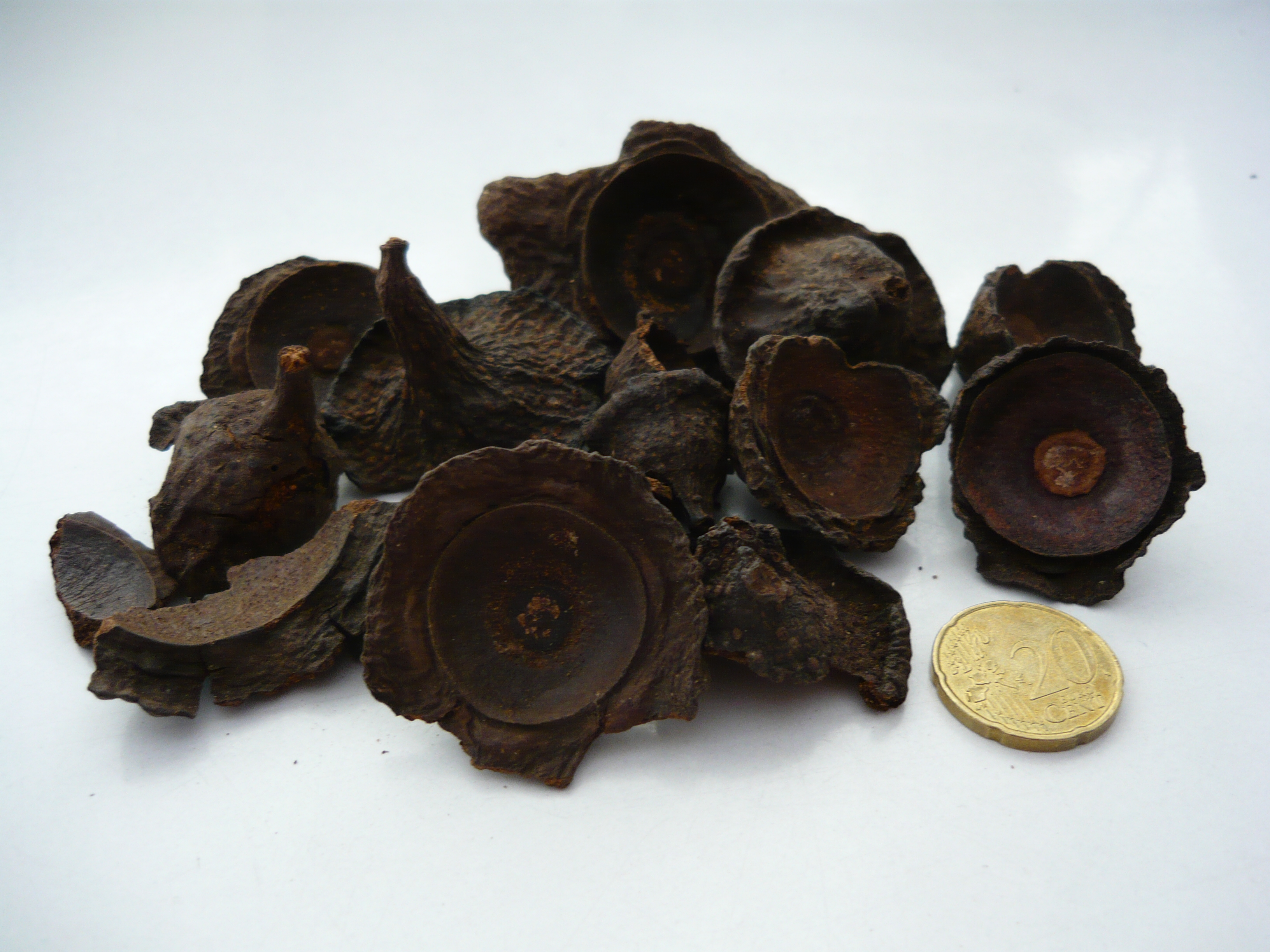 Ocotea quixos, Lauraceae, ishpingo. Cúpulas del fruto usadas en Ecuador para aromatizar bebidas como la Colada Morada.